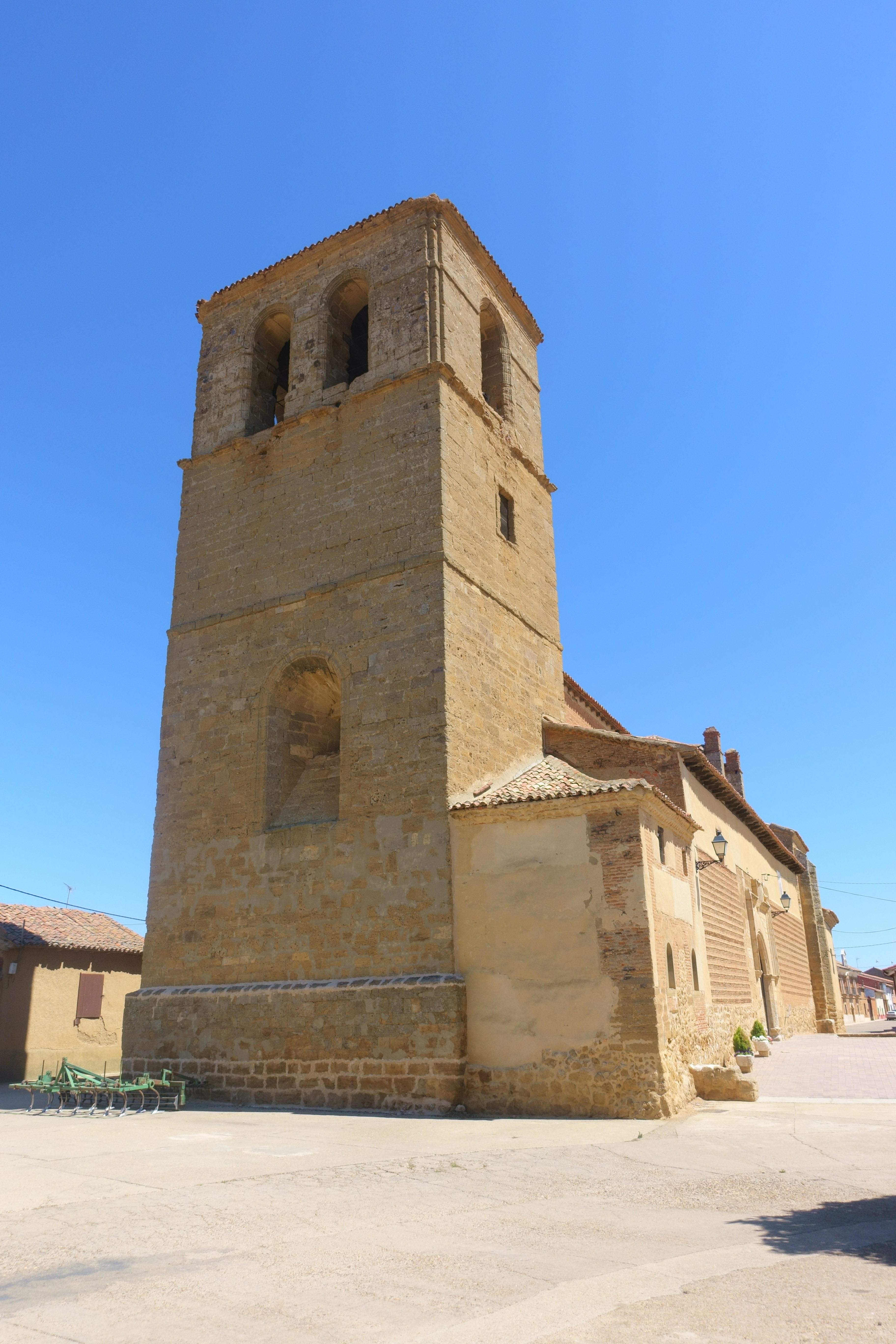 Iglesia de la Asunción de Nuestra Señora, en Villamayor de Campos (Zamora, España).